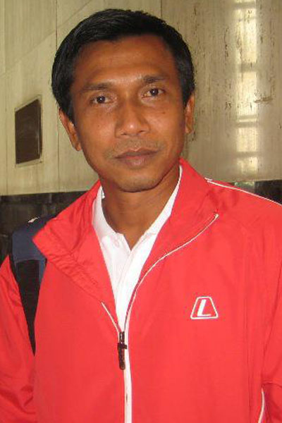 Widodo C. Putro dalam persiapan melawan AC Milan Glorie di Jakarta